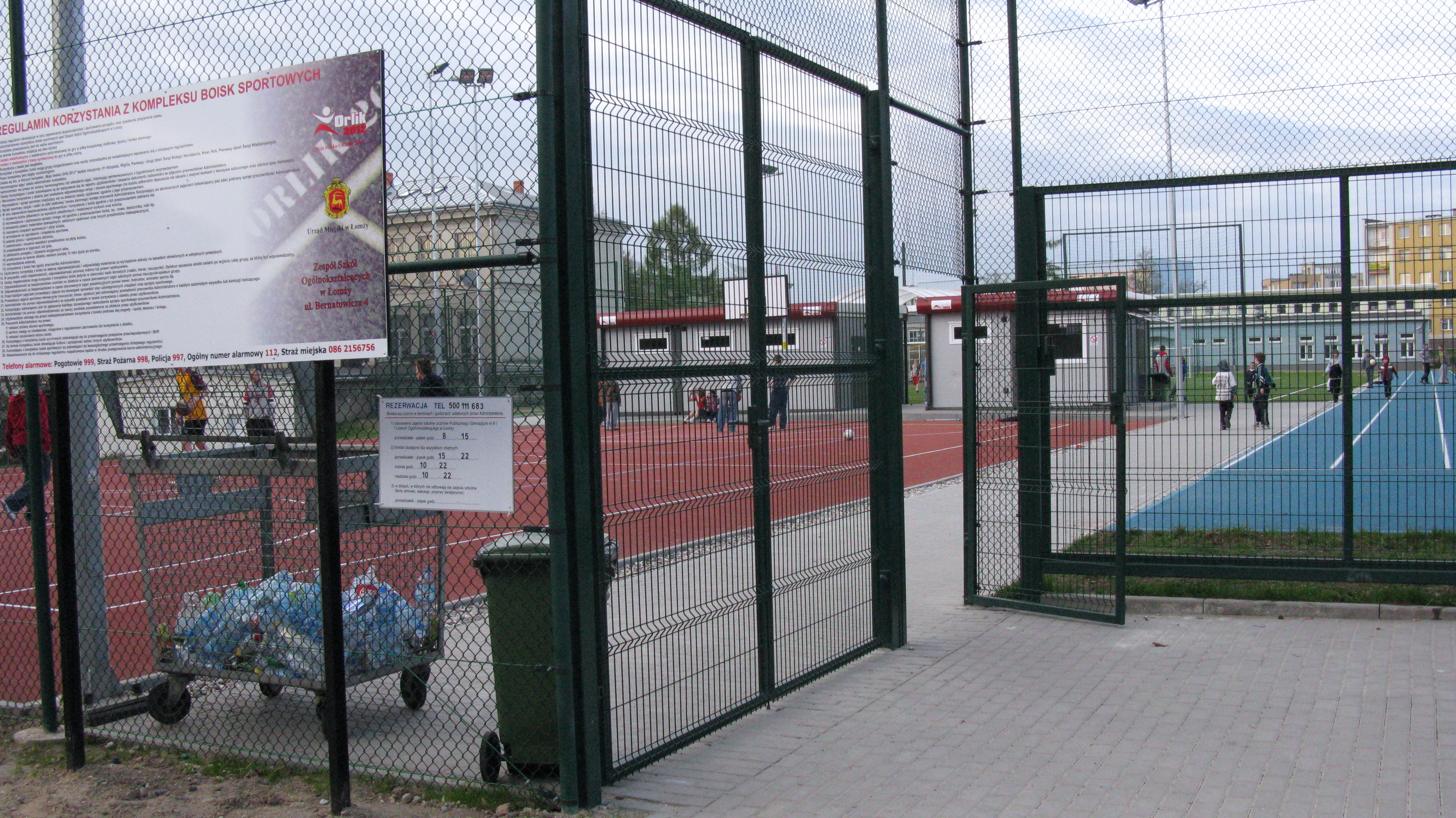 Boisko "Orlik" przy I Liceum Ogólnokształcącym w Łomży